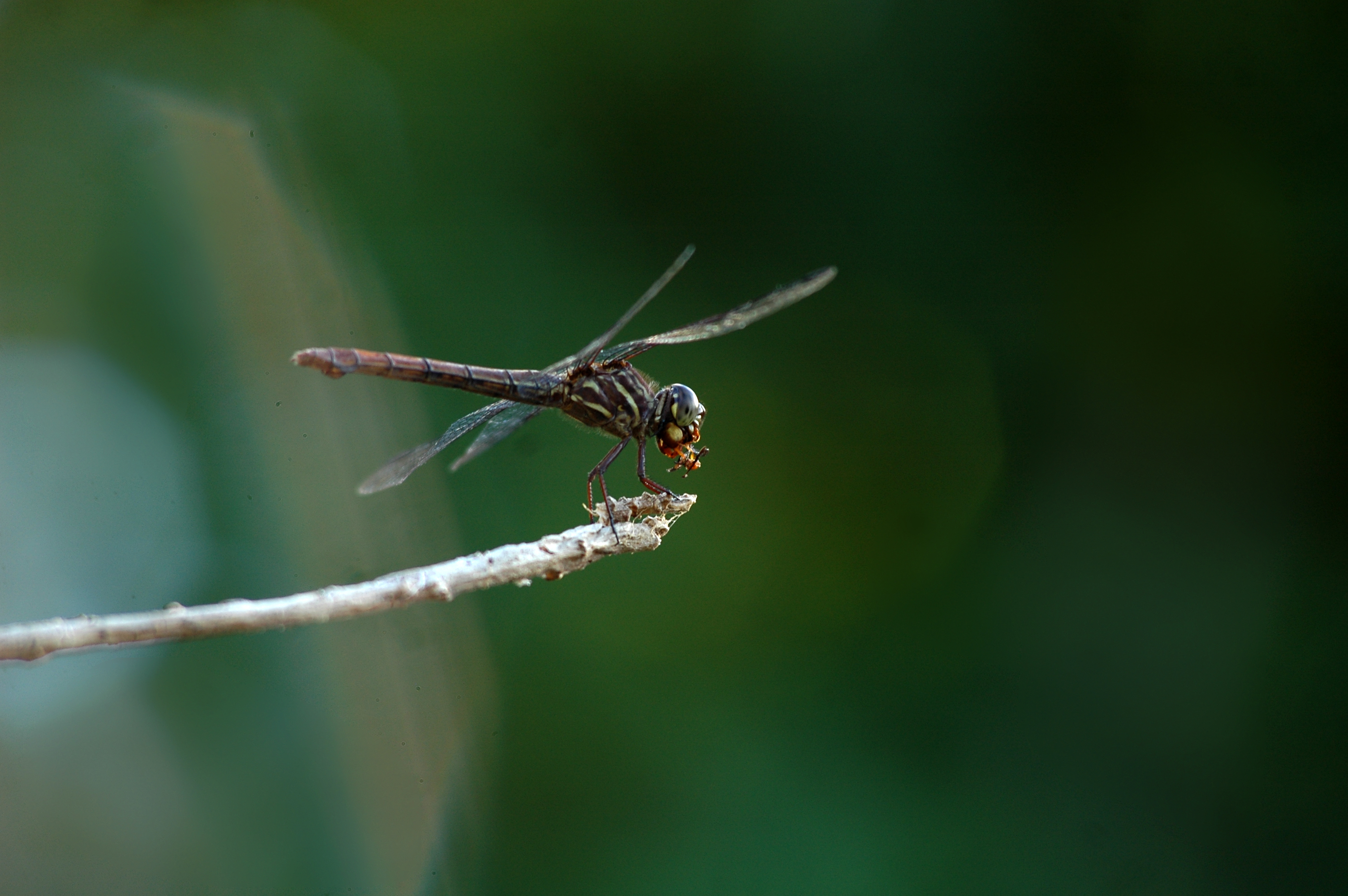 Photo prise au mois de février.